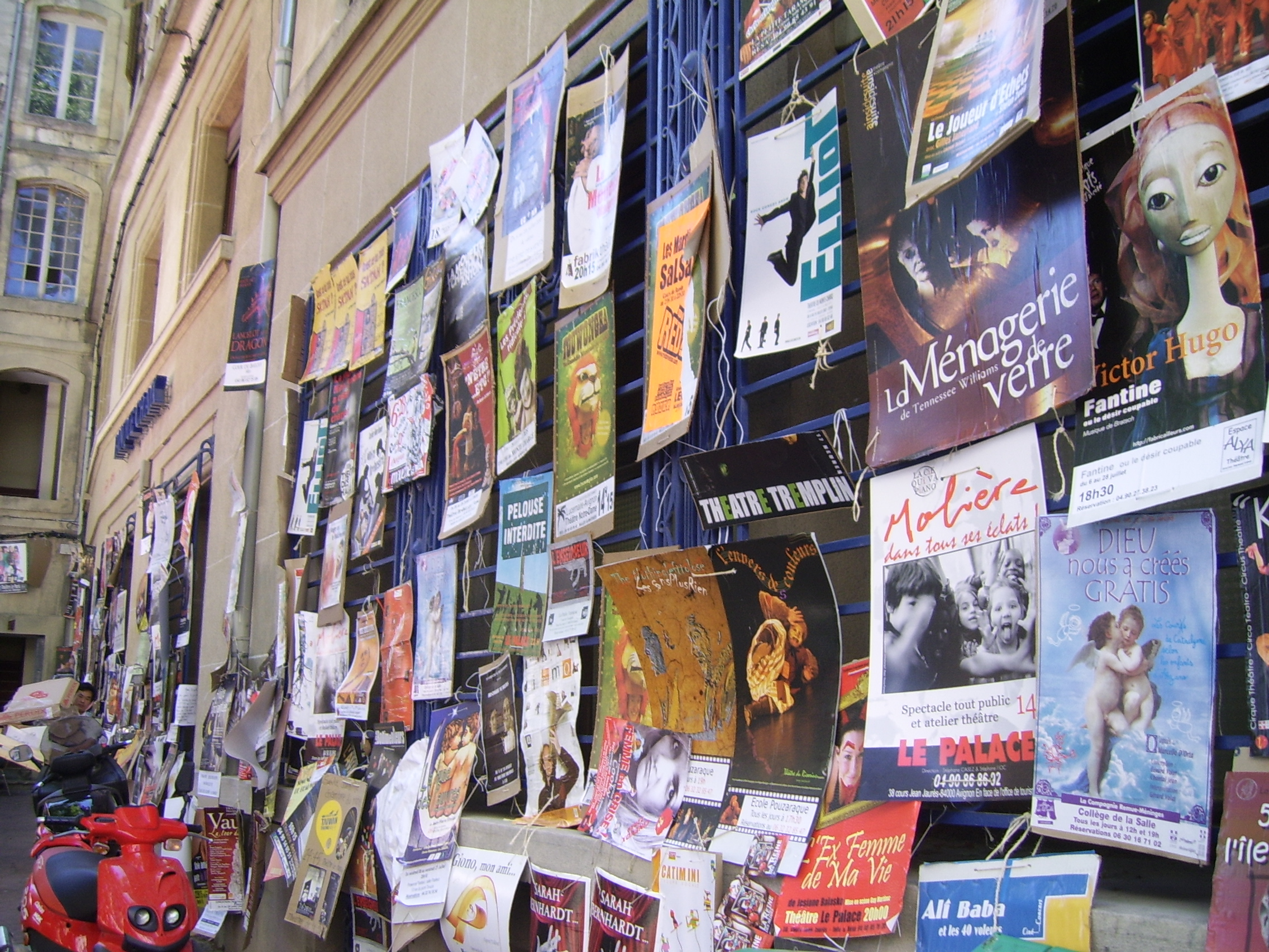 Affiches des spectacles du festival-Off d'Avignon en 2007